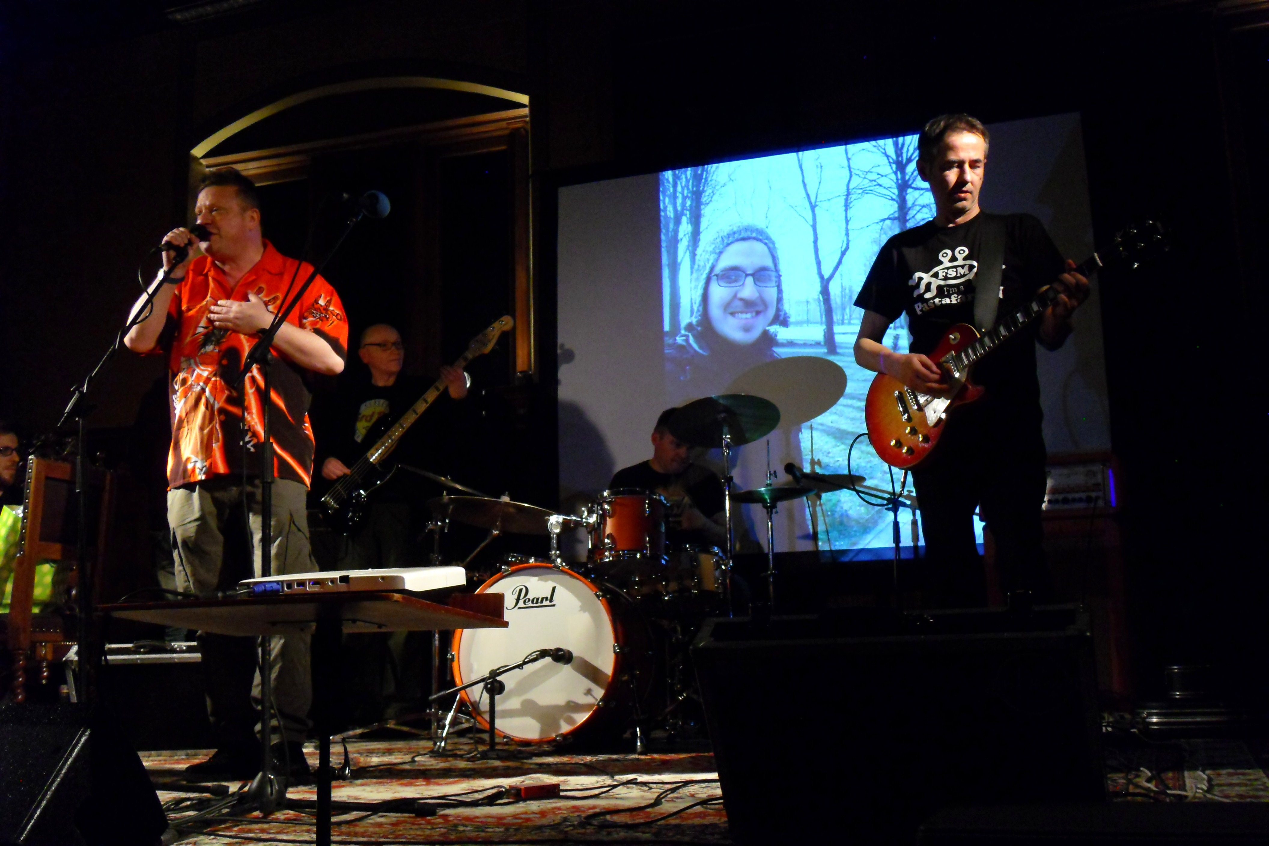 Zespół "Bielizna" w gdańskim Ratuszu Starego Miasta (Wielka Sala).